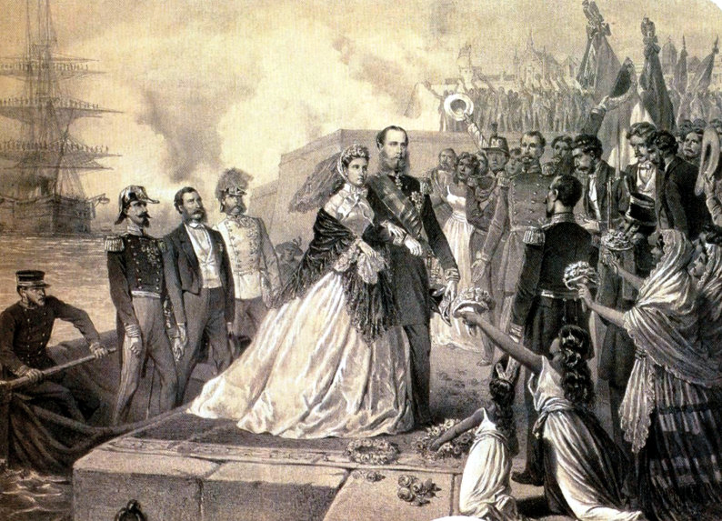 Llegada del Emperador Maximiliano y la Emperatriz Carlota al puerto de Veracru, México